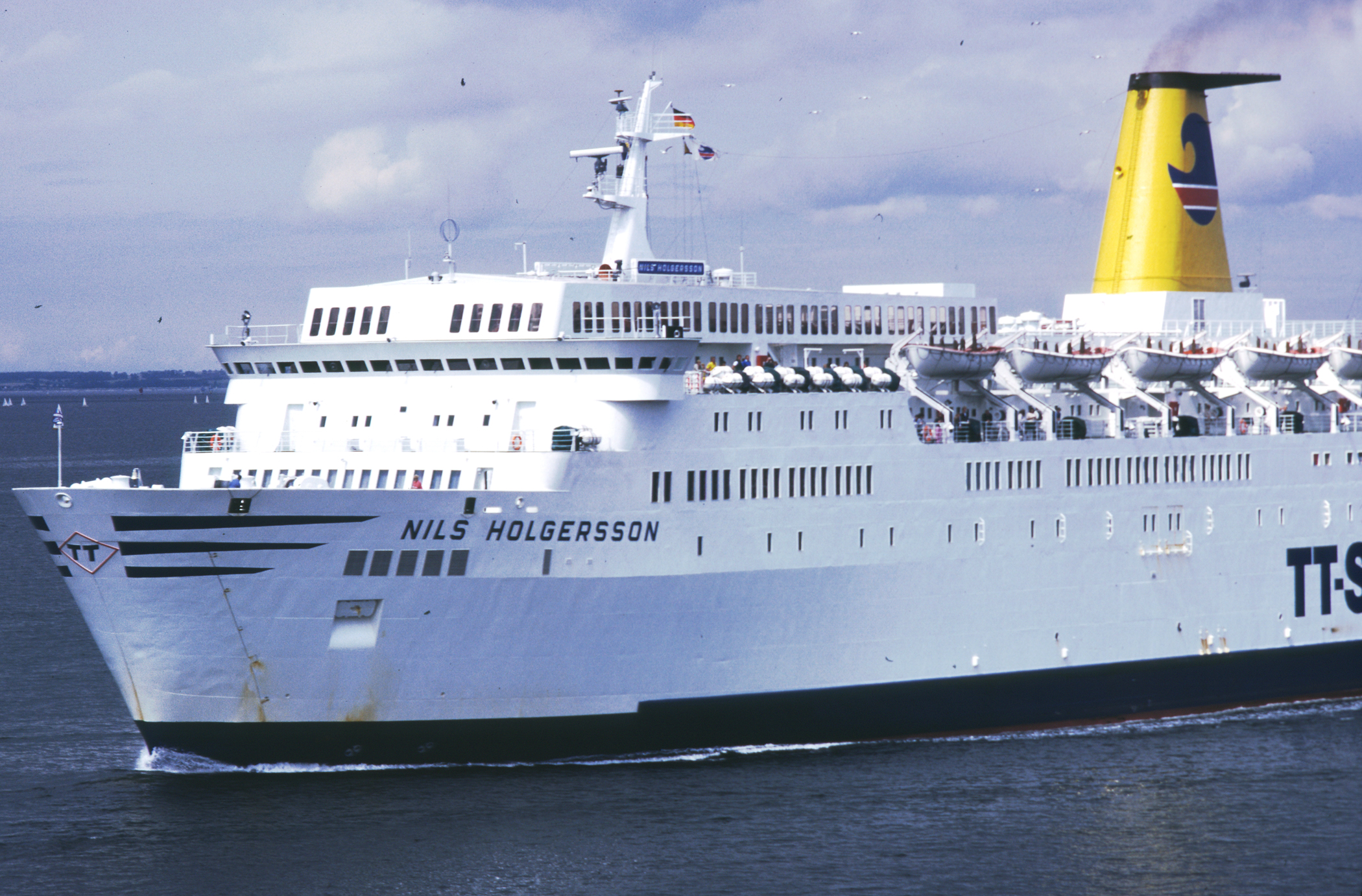 Die Nils Holgersson III (in Dienst 1975 – 1984) der deutschen Fährschiffreederei TT-Line. Hier 1981 zwischen Gedser und Travemünde auf der Ostsee.